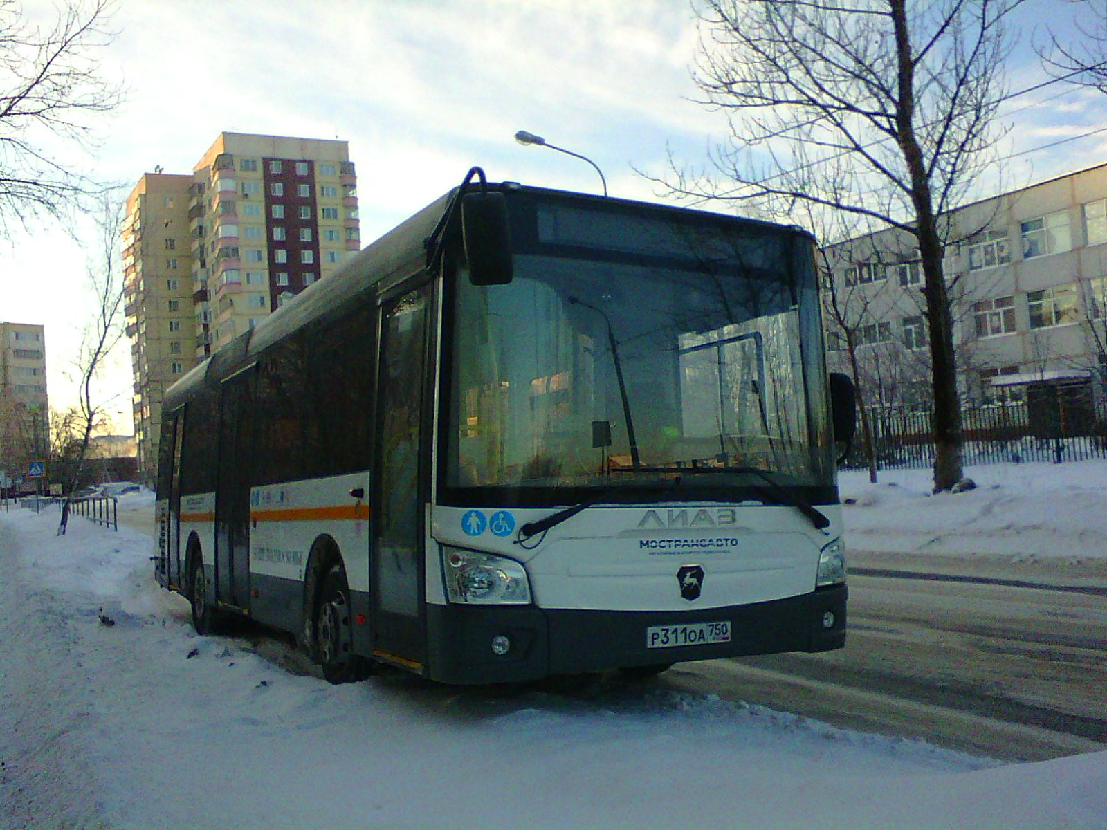 ЛИАЗ 4292 Мострансавто, Наро-Фоминск